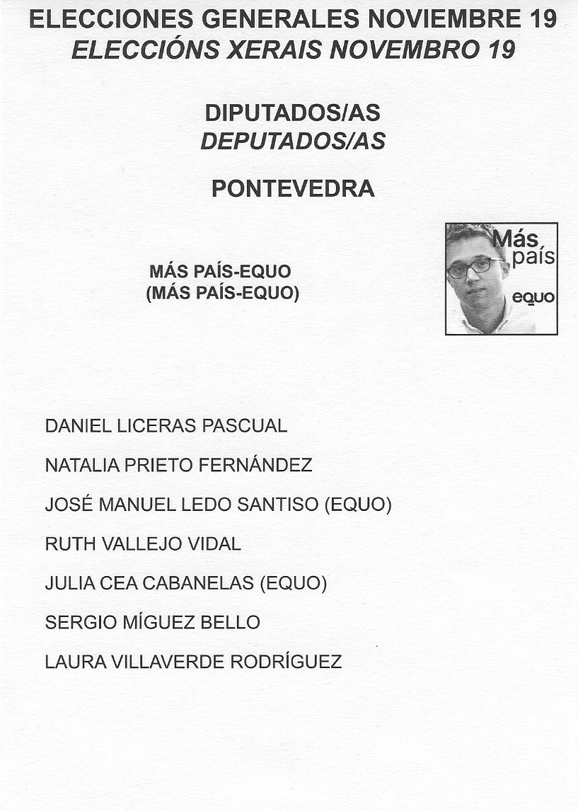 Papeleta electoral para o Congreso dos Deputados - Eleccións Xerais de España de novembro de 2019, Circunscrición electoral de Pontevedra